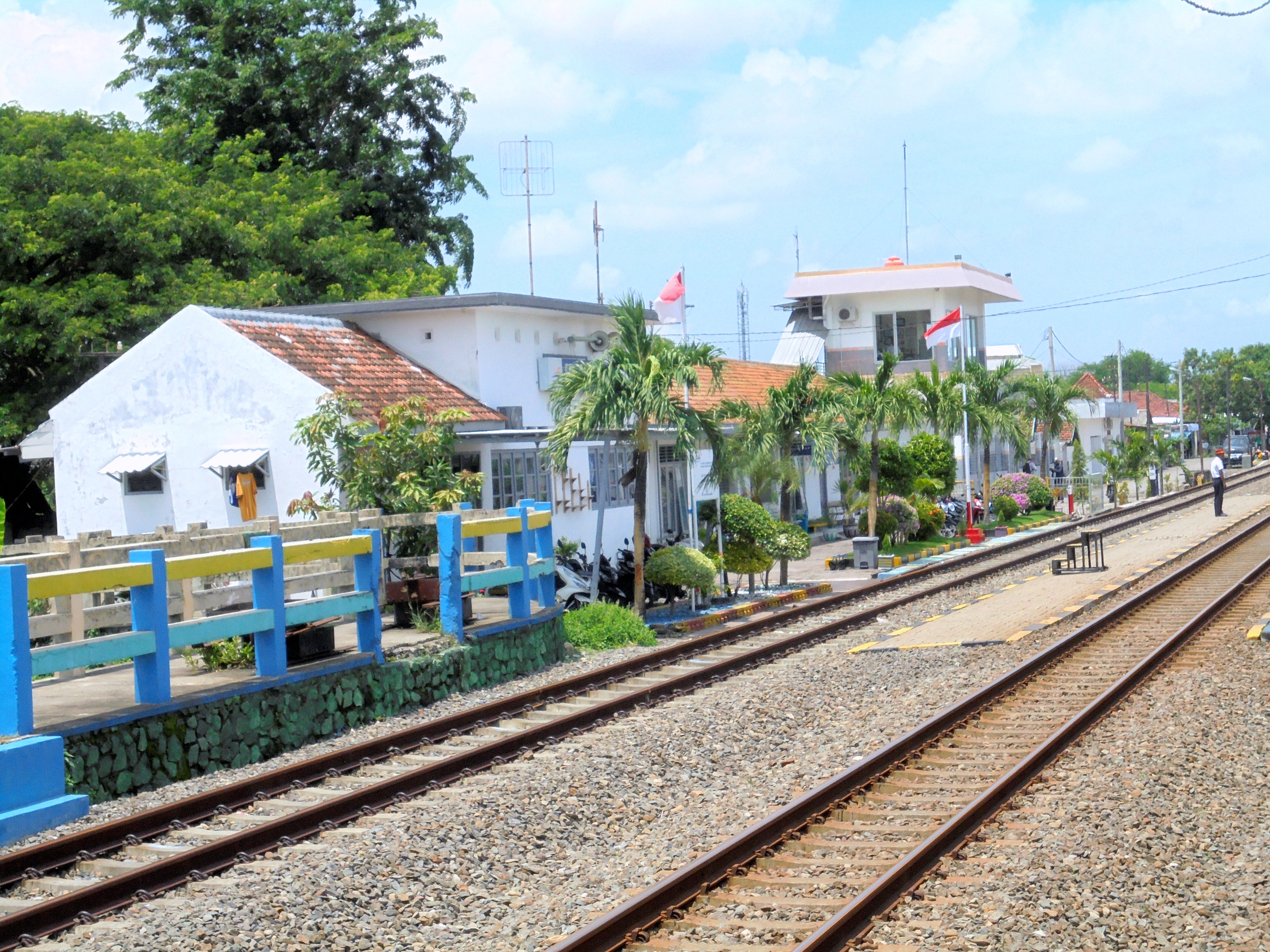 Peron Stasiun Kandangan tahun 2020